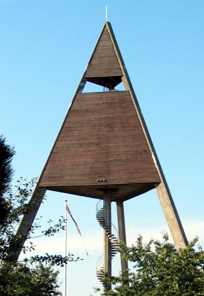 Vandtårnet i Svaneke i Danmark, fotograferet fra nærliggende villakvarter